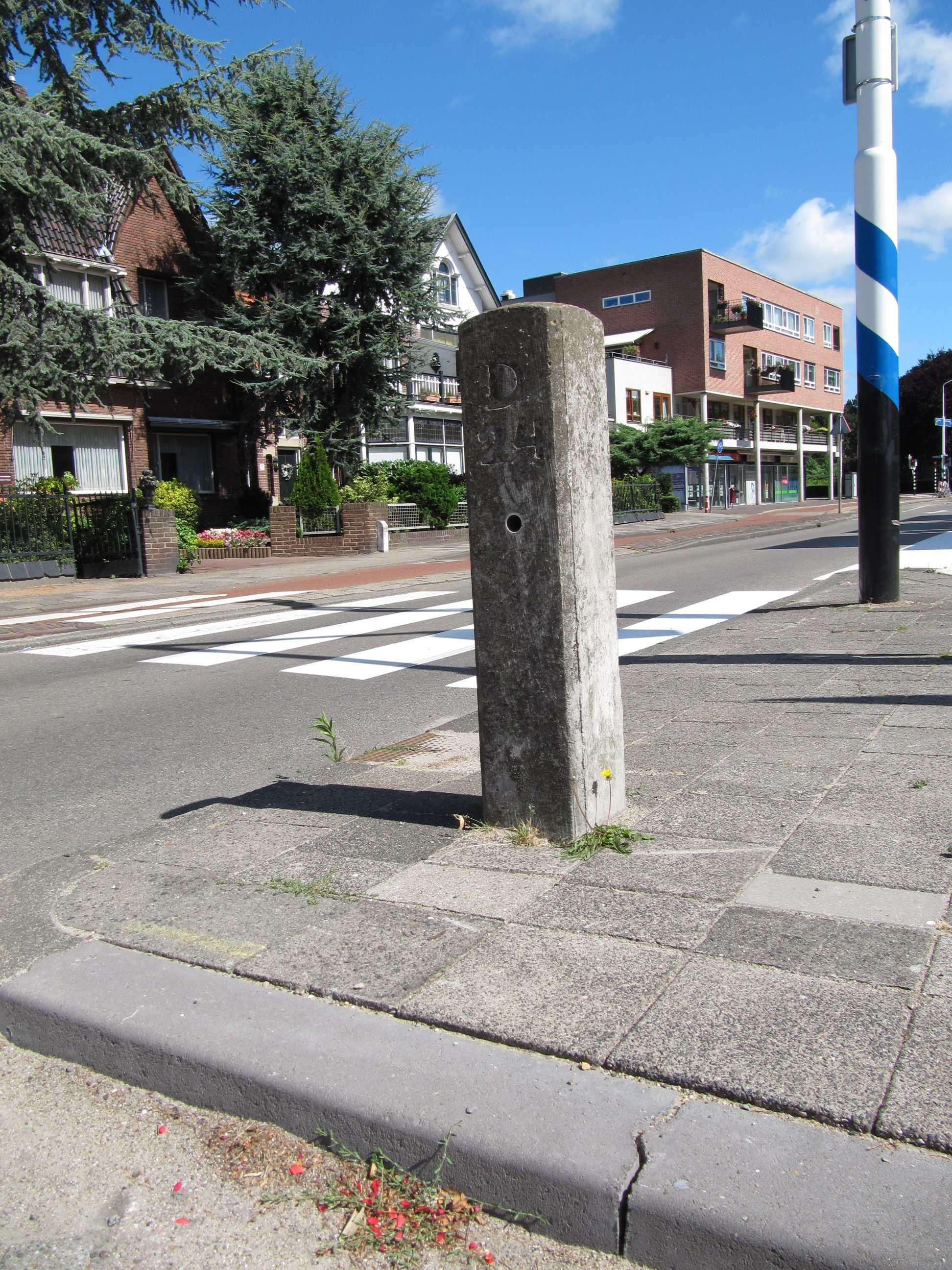 Leidschendam - Voorburgseweg bij 1.jpg, rijksmonument Tussenpaal. Aan de ene kant RL24 en aan de andere kant D24.